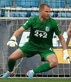 Євген Боровик - футболіст Чорноморця (Одеса)